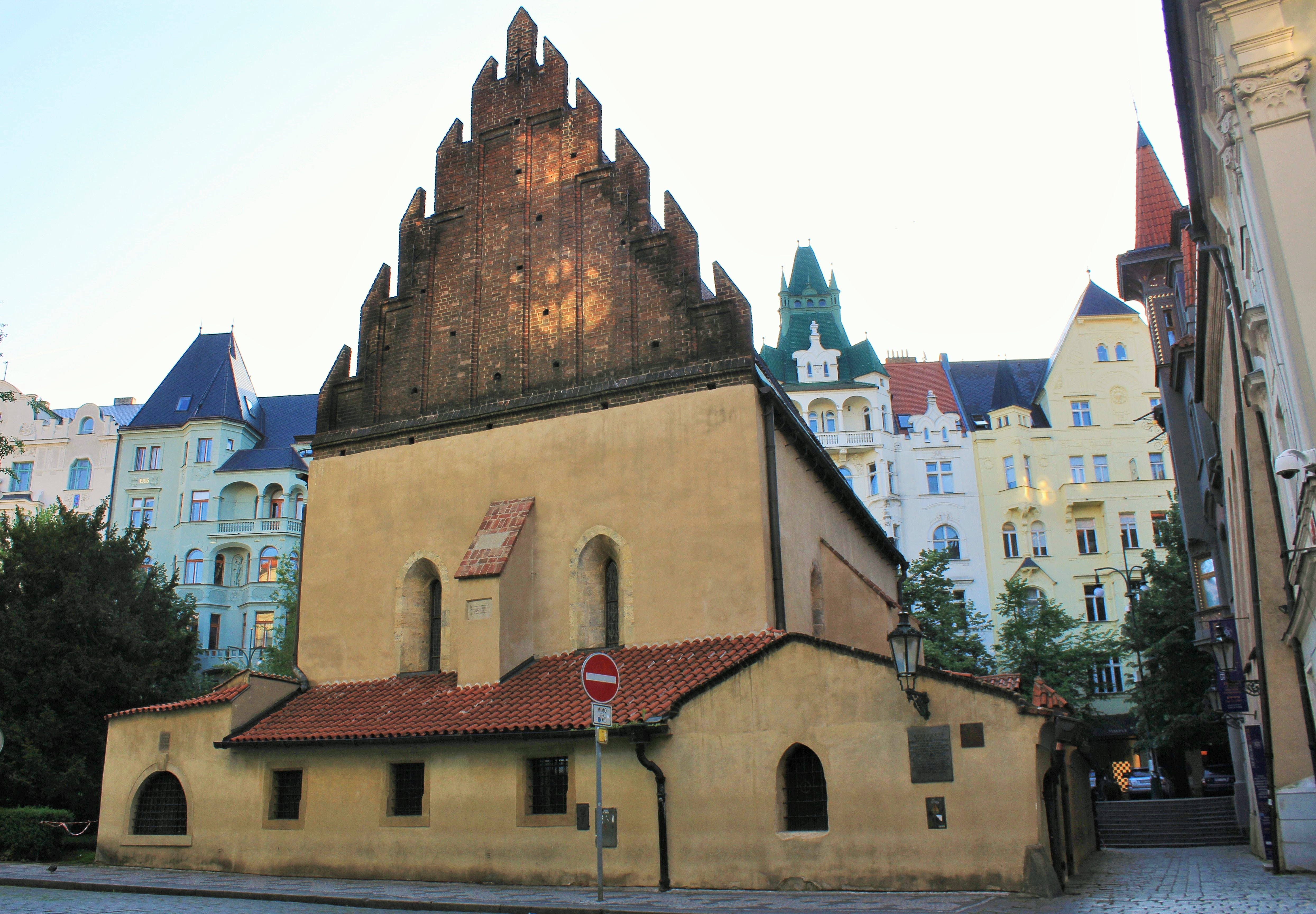 Den gammelnye synagogen